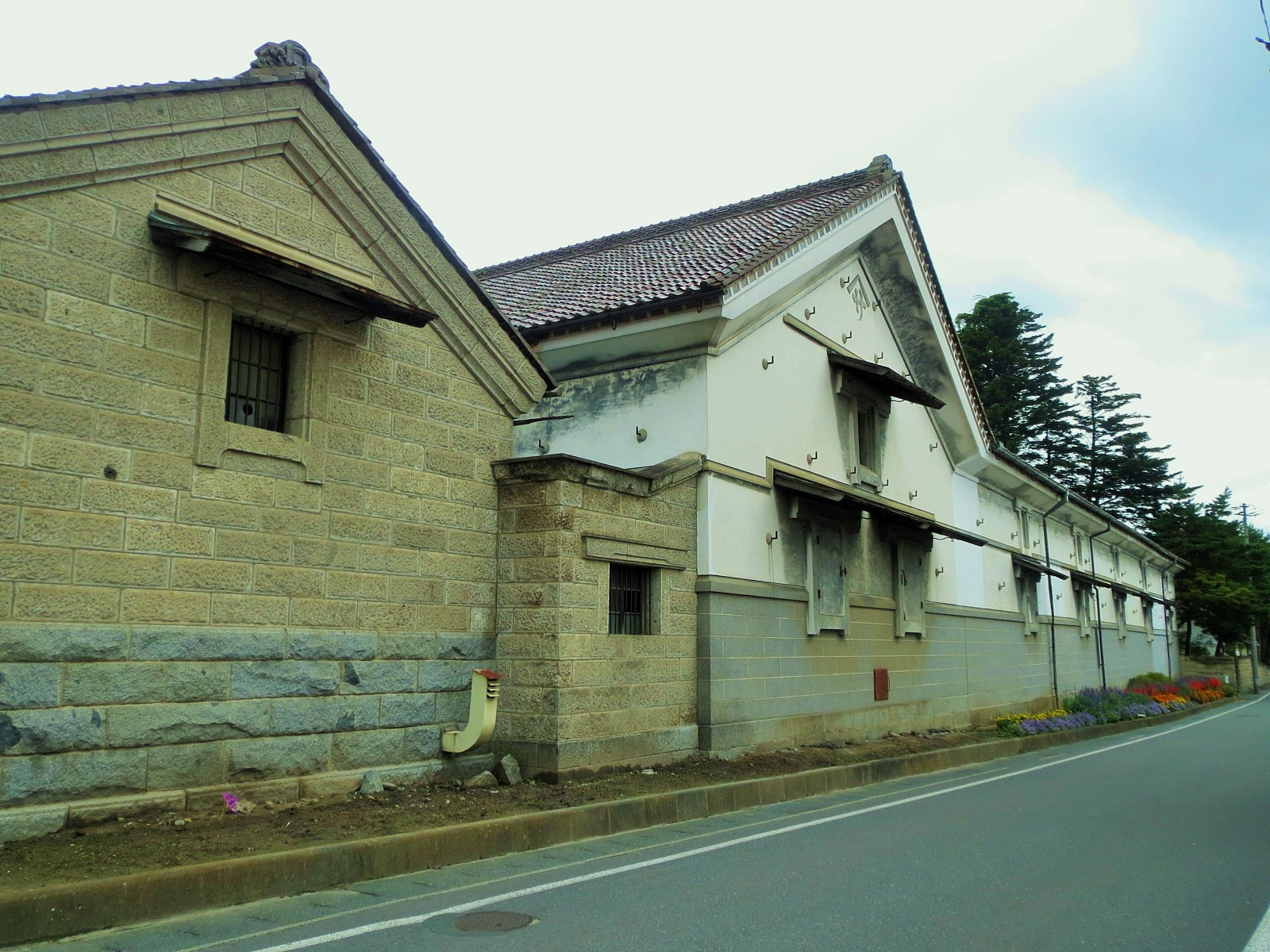 佐藤家住宅造り蔵 Canon IXY 3